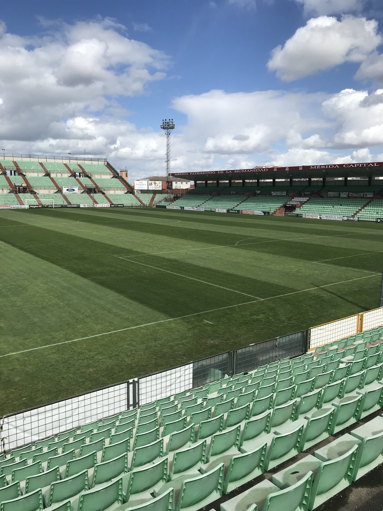 Vista del Estadio Romano de Mérida (España) desde fondo sur.